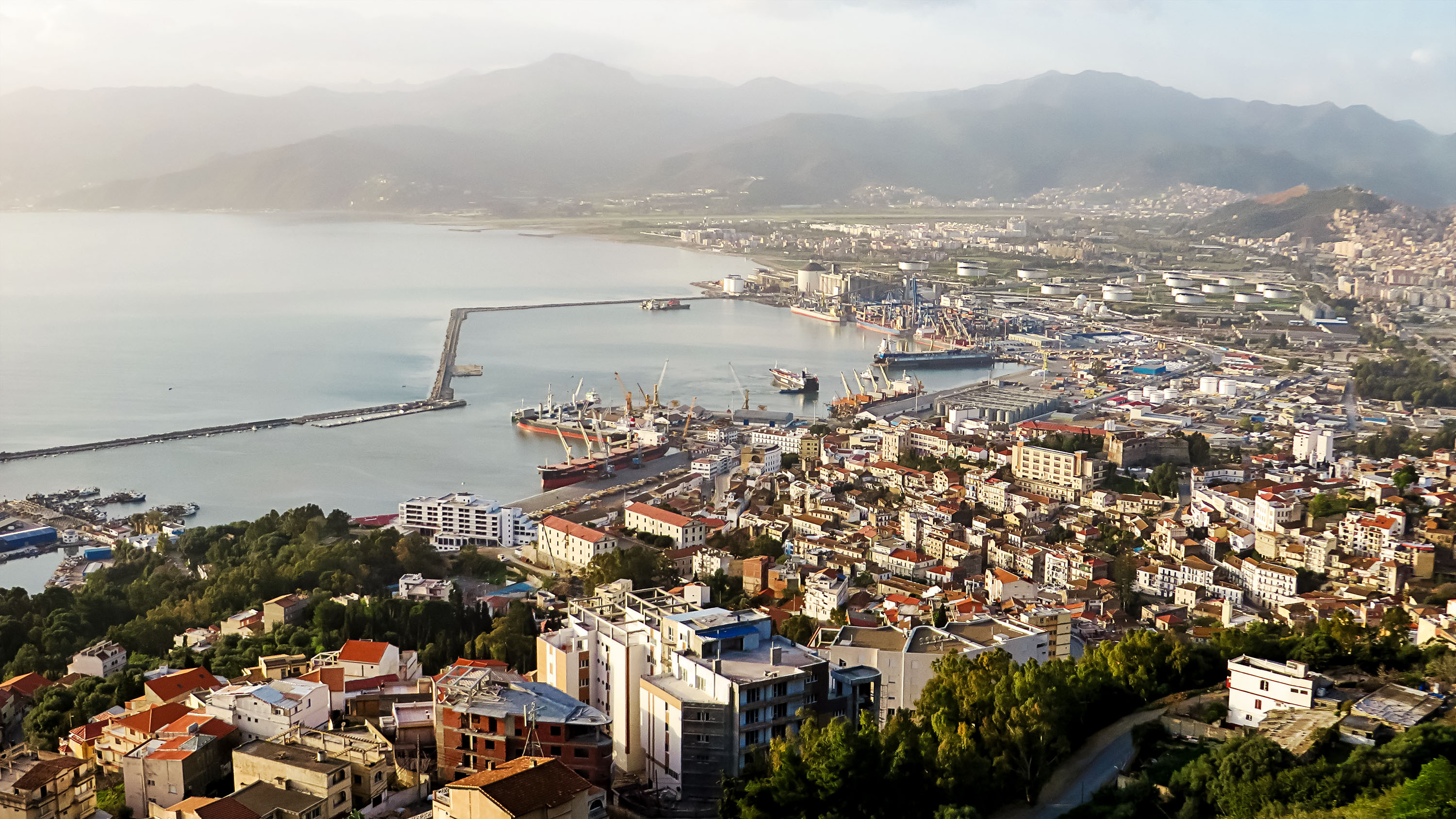 Ville de Béjaia - Algérie مدينة بجاية - الجزائر